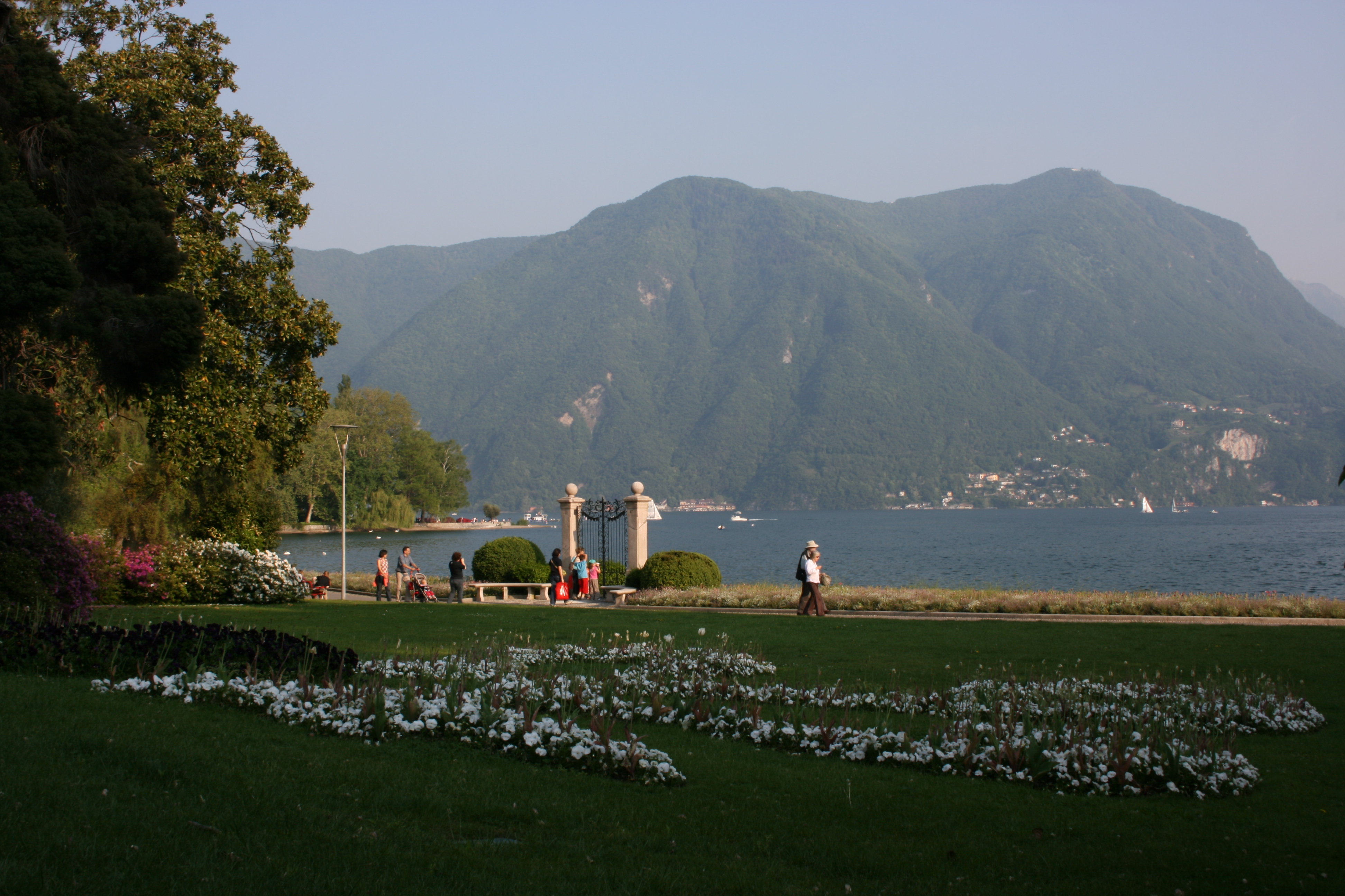 Looking from Parco Civico across Lago di Lugano.